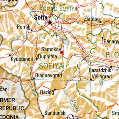 Samokow- Lage des Ortes in Bulgarien